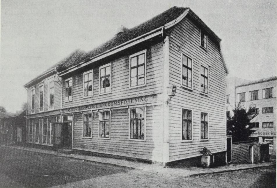 Dues hus i Asylgaten 6 slik det fremsto i 1881 og da Ynglingen startet å bruke huset (hvor senere Bøndenes Hus ble bygget på 1960 tallet)